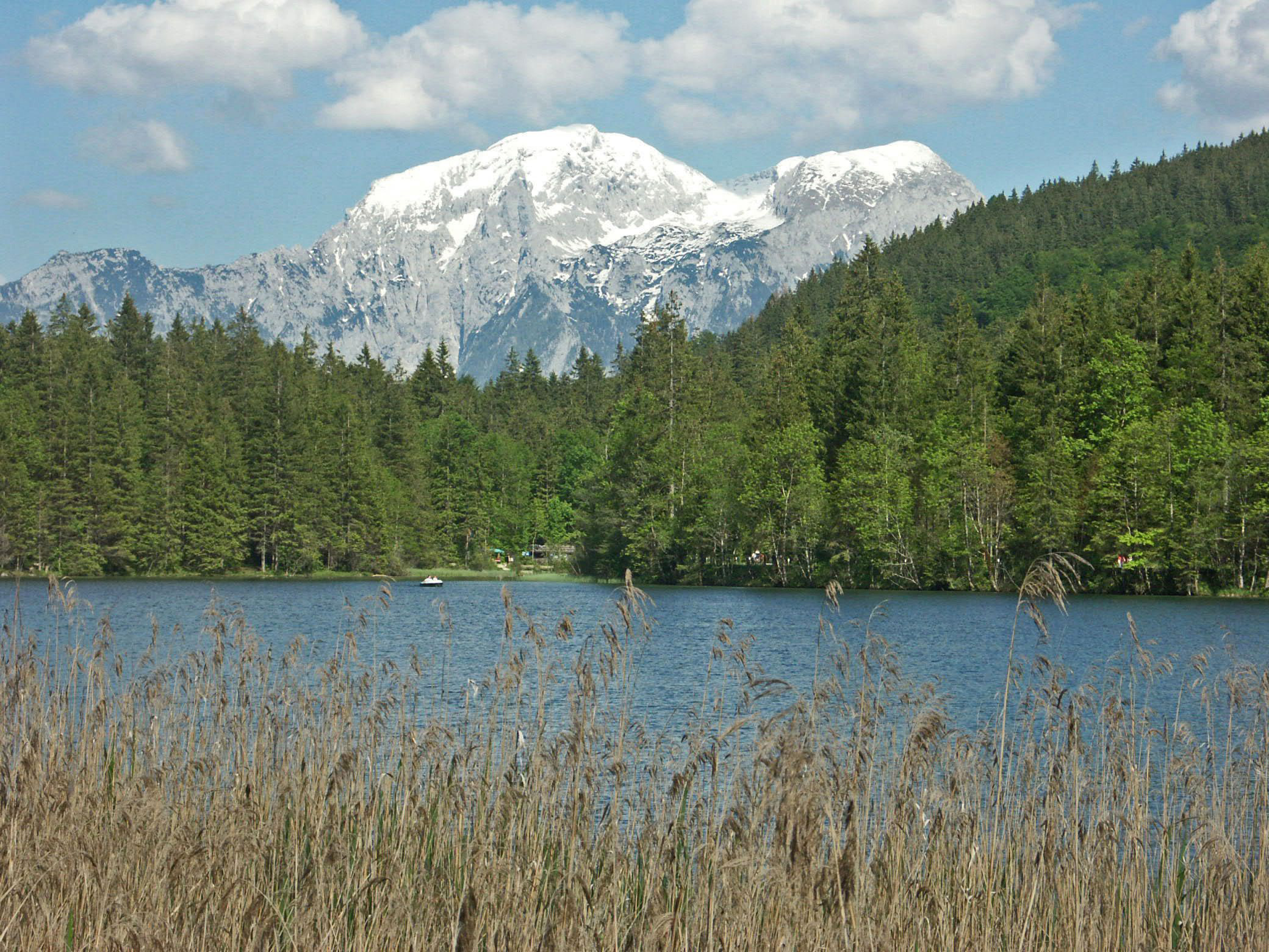 Der Hohe Göll vom Hintersee bei Ramsau aus